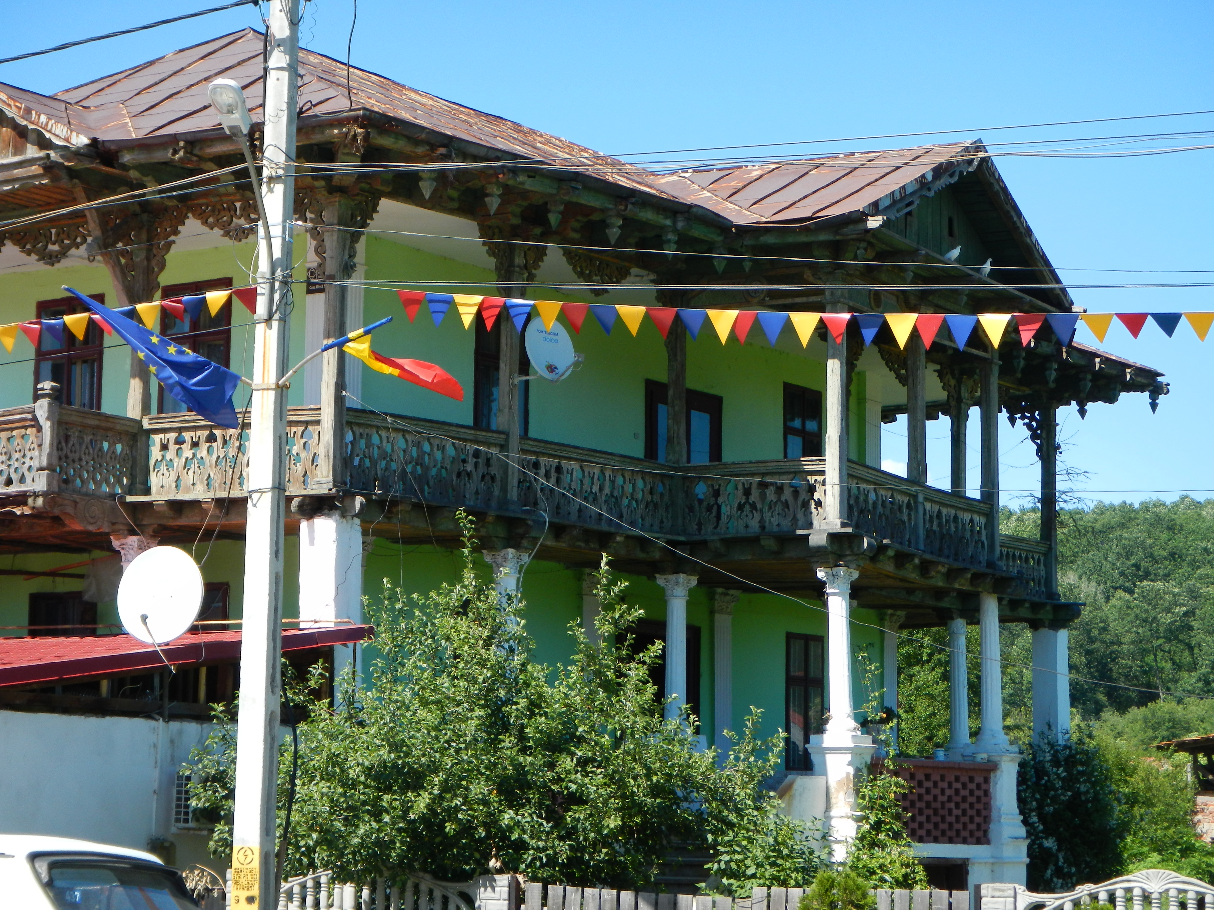 Casa Dincă Schileru